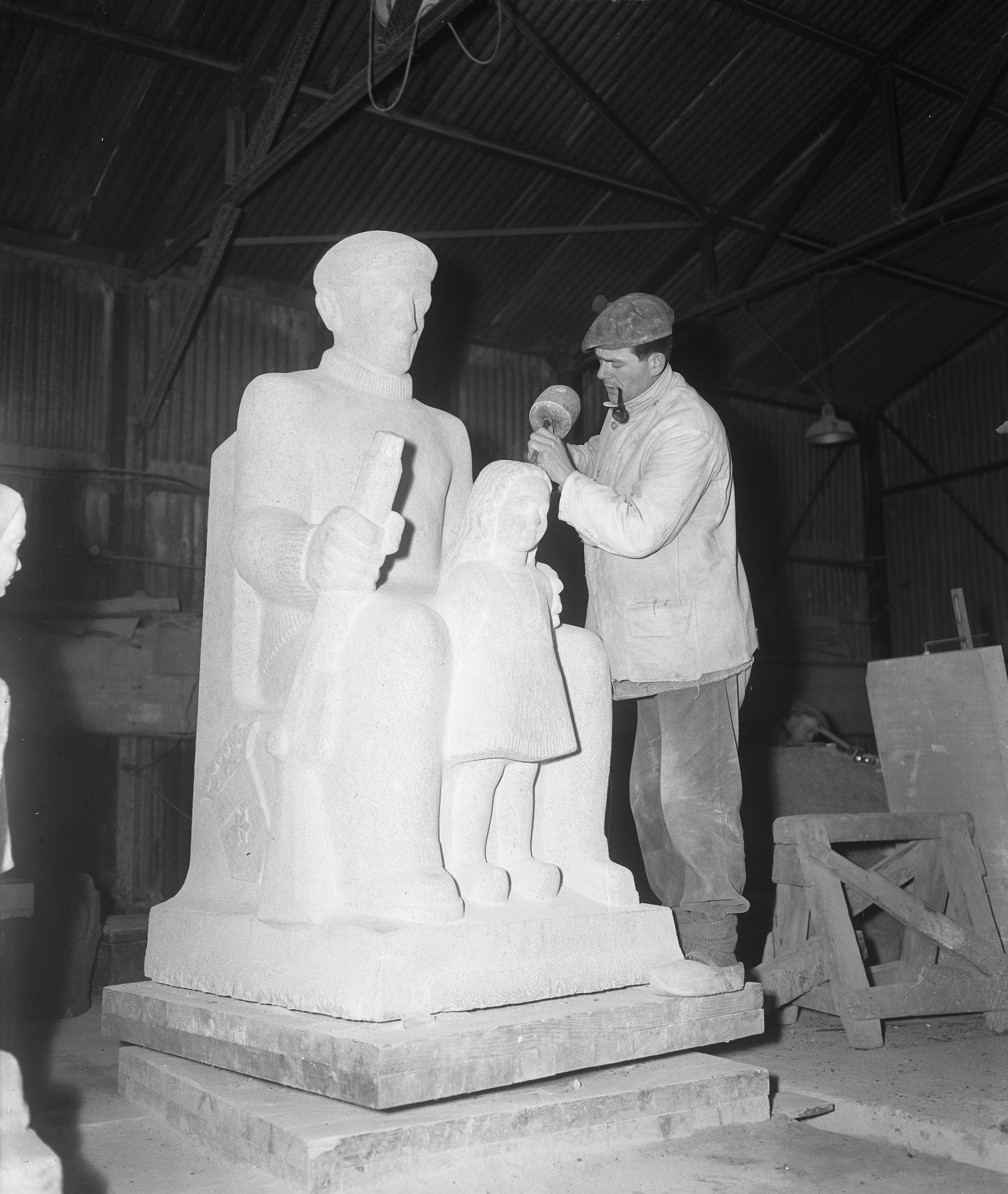 Collectie / Archief : Fotocollectie Anefo Reportage / Serie : [ onbekend ] Beschrijving : Verzetsmonument op grens Friesland-Groningen Annotatie : Van beeldhouwer Nico Onkenhout in Van Tetterode's Steenhouwerij aan de Duivendrechtsekade te Duivendrecht. Plaats: Duivendrecht, Noord-Holland. Het beeld was bestemd voor de gemeente Kollumerland Datum : 25 januari 1950 Locatie : Duivendrecht Trefwoorden : beeldhouwers, beeldhouwwerken Persoonsnaam : Onkenhout, Nico Fotograaf : Winterbergen, […] / Anefo, [onbekend] Auteursrechthebbende : Nationaal Archief Materiaalsoort : Glasnegatief Nummer archiefinventaris : bekijk toegang 2.24.01.09 Bestanddeelnummer : 903-8027